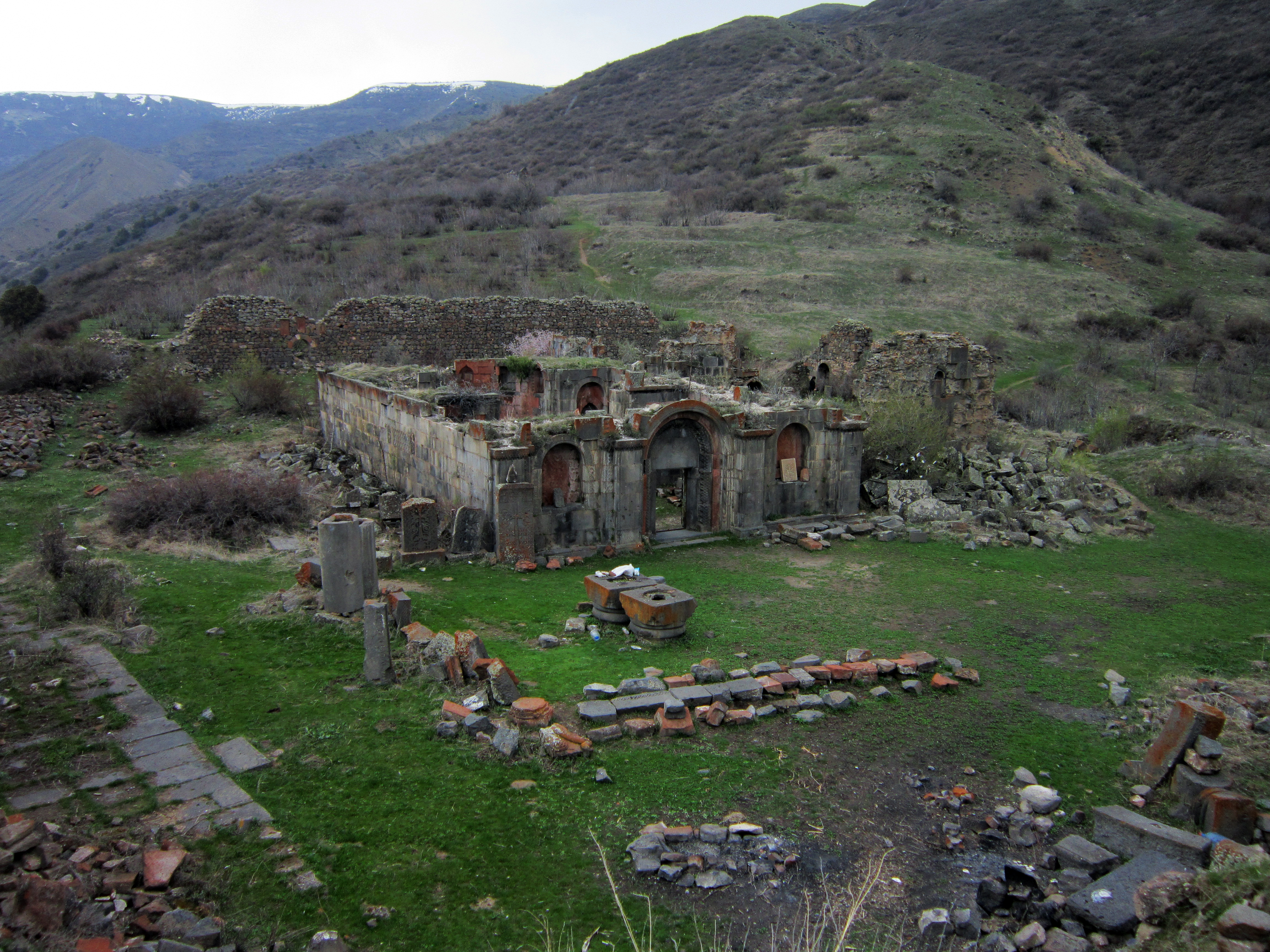 Հավուց Թառի երկրորդ եկեղեցին 99.4/3.2